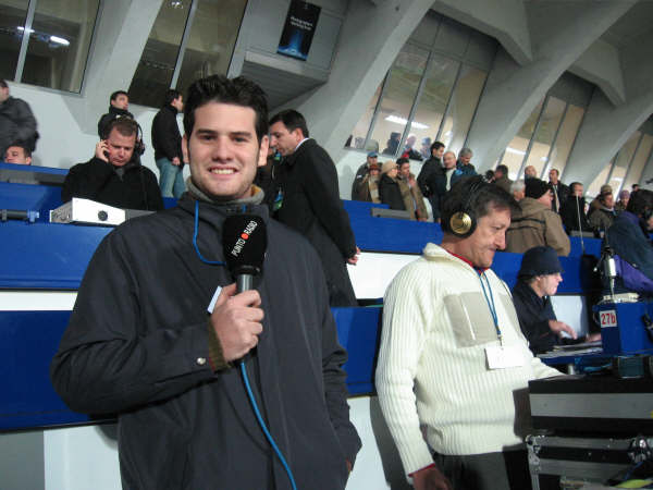 El locutor Quim Domènech